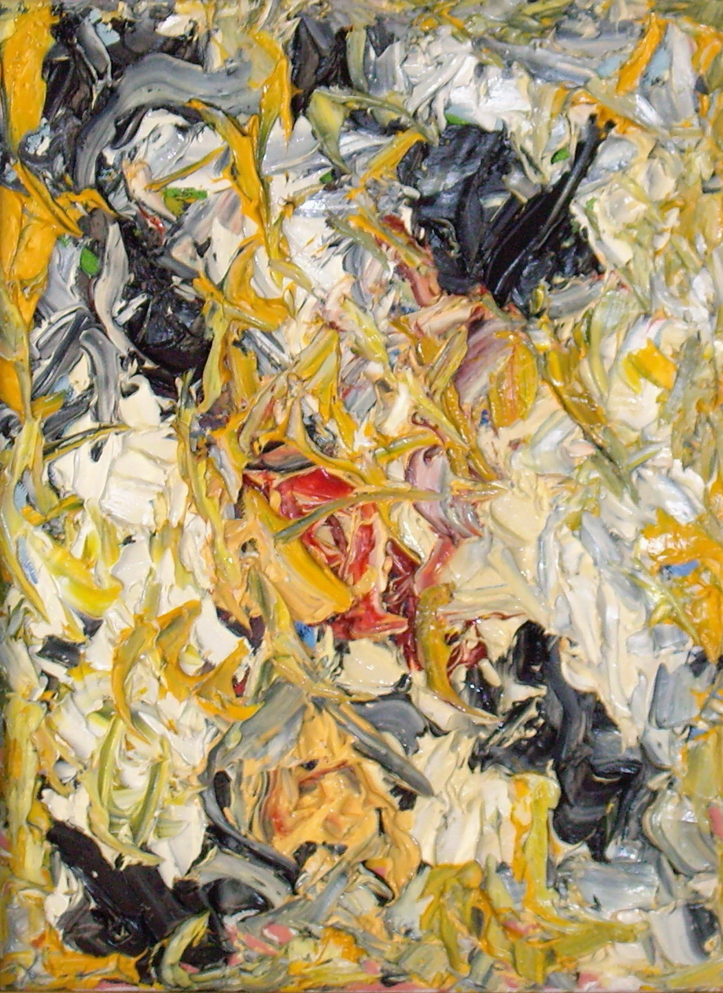 huile sur toile cm 40 x 30